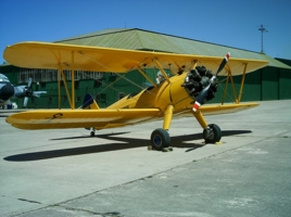 1-E-31 frente al Hangar de Restauración del MUAN.